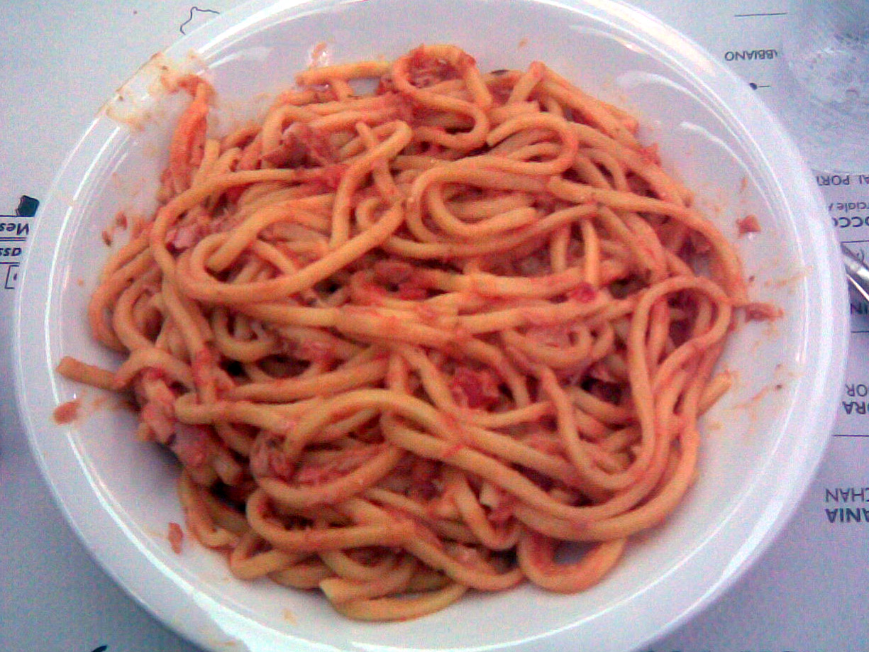 troccoli al sugo nel piatto